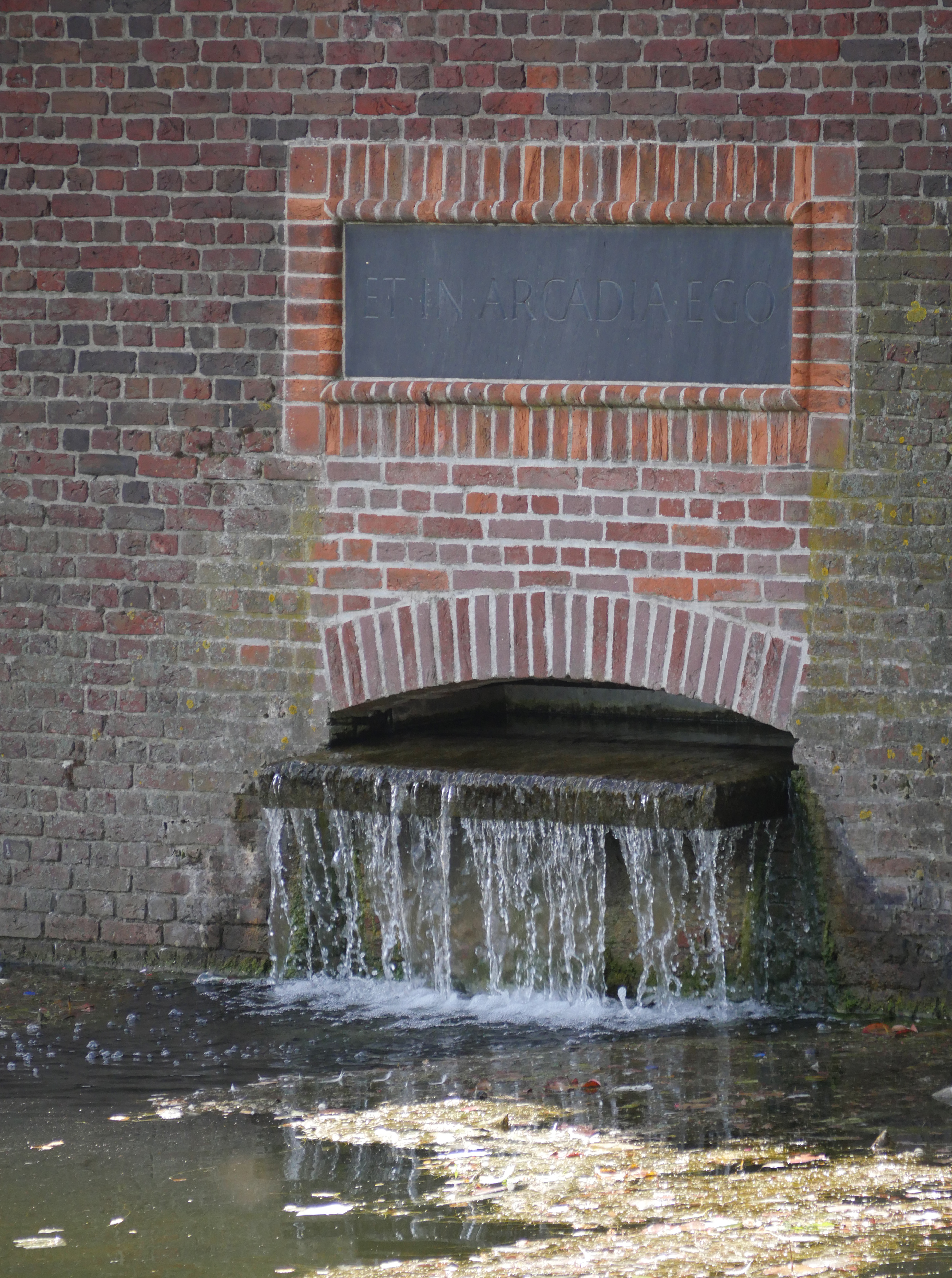 Volgens dit artikel komt hier water uit de Haagse Beek in de hofvijver; relief by Ian Hamilton Finlay.